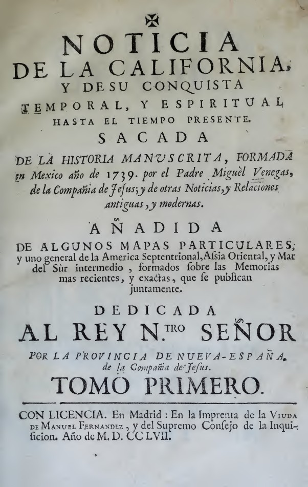 VENEGAS, Miguel (1680-1764). Noticia de la California, y de su conquista temporal, y espiritual hasta el tiempo presente. Sacada de la historia manuscrita, formada en Mexico año de 1739.... Madrid: Viuda de Manuel Fernández, y del Supremo Consejo de la Inquisición, 1757.